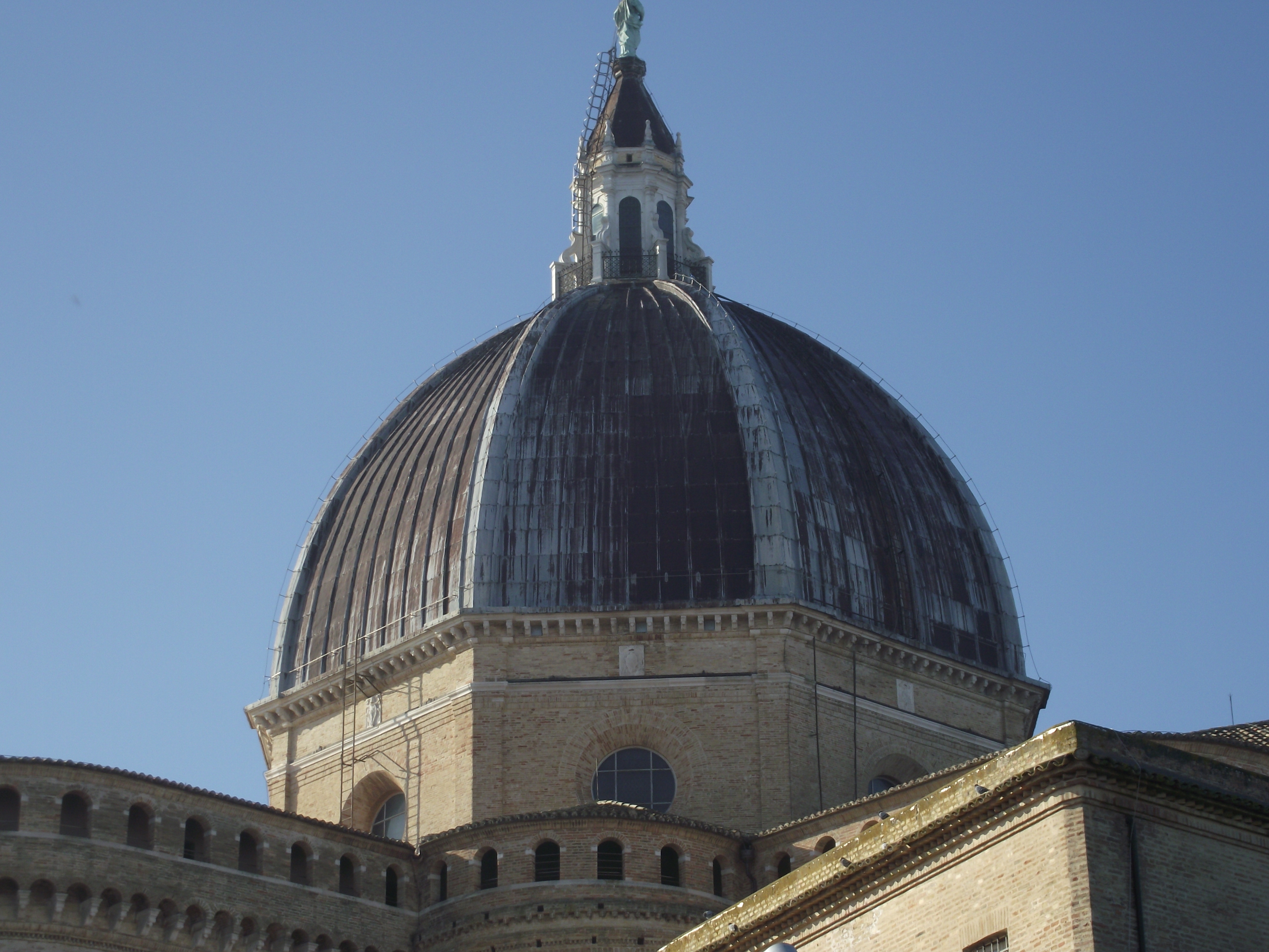 Loreto, Basilica della Santa Casa, 1468